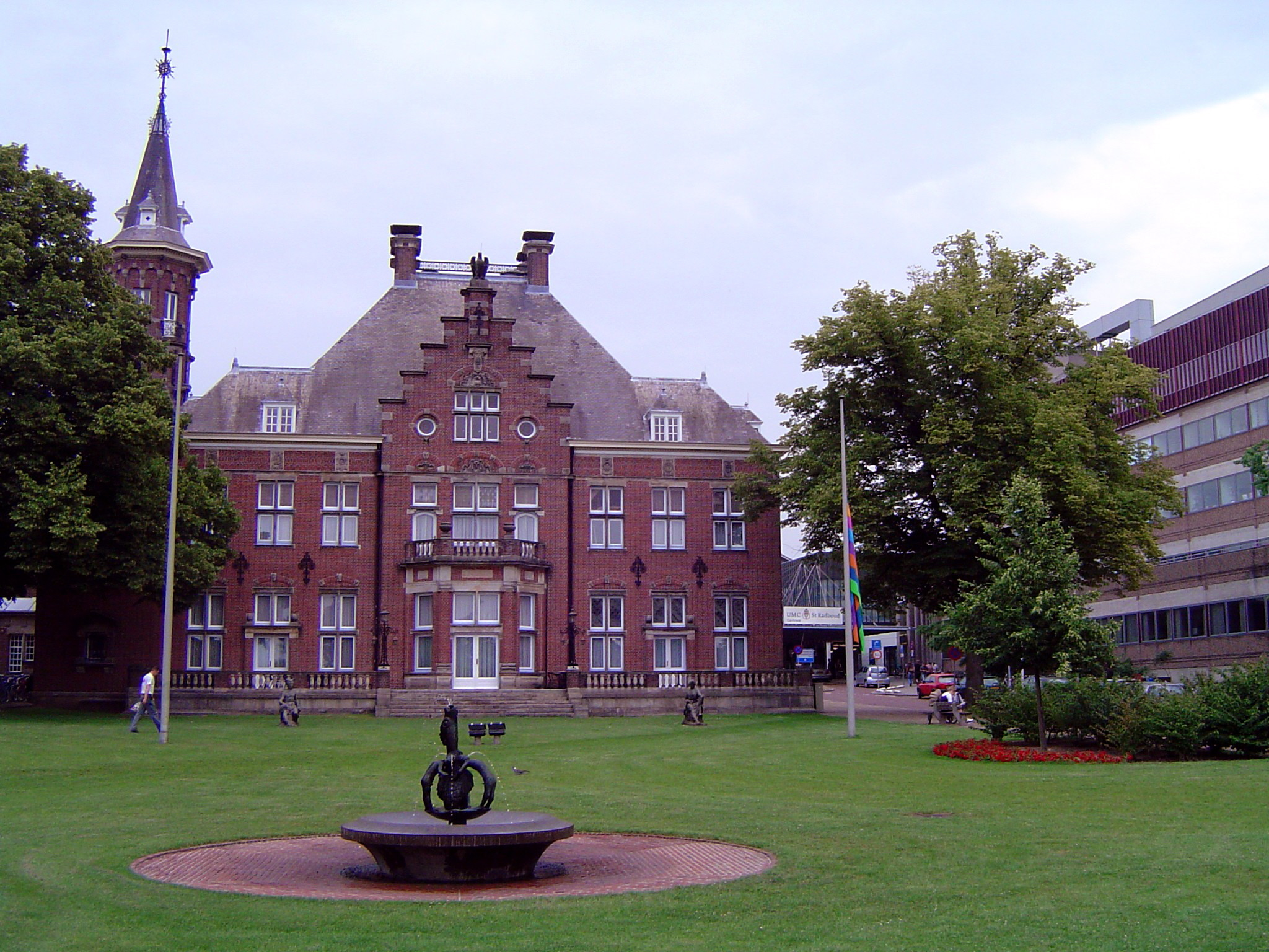 Radboud, château Heyendael